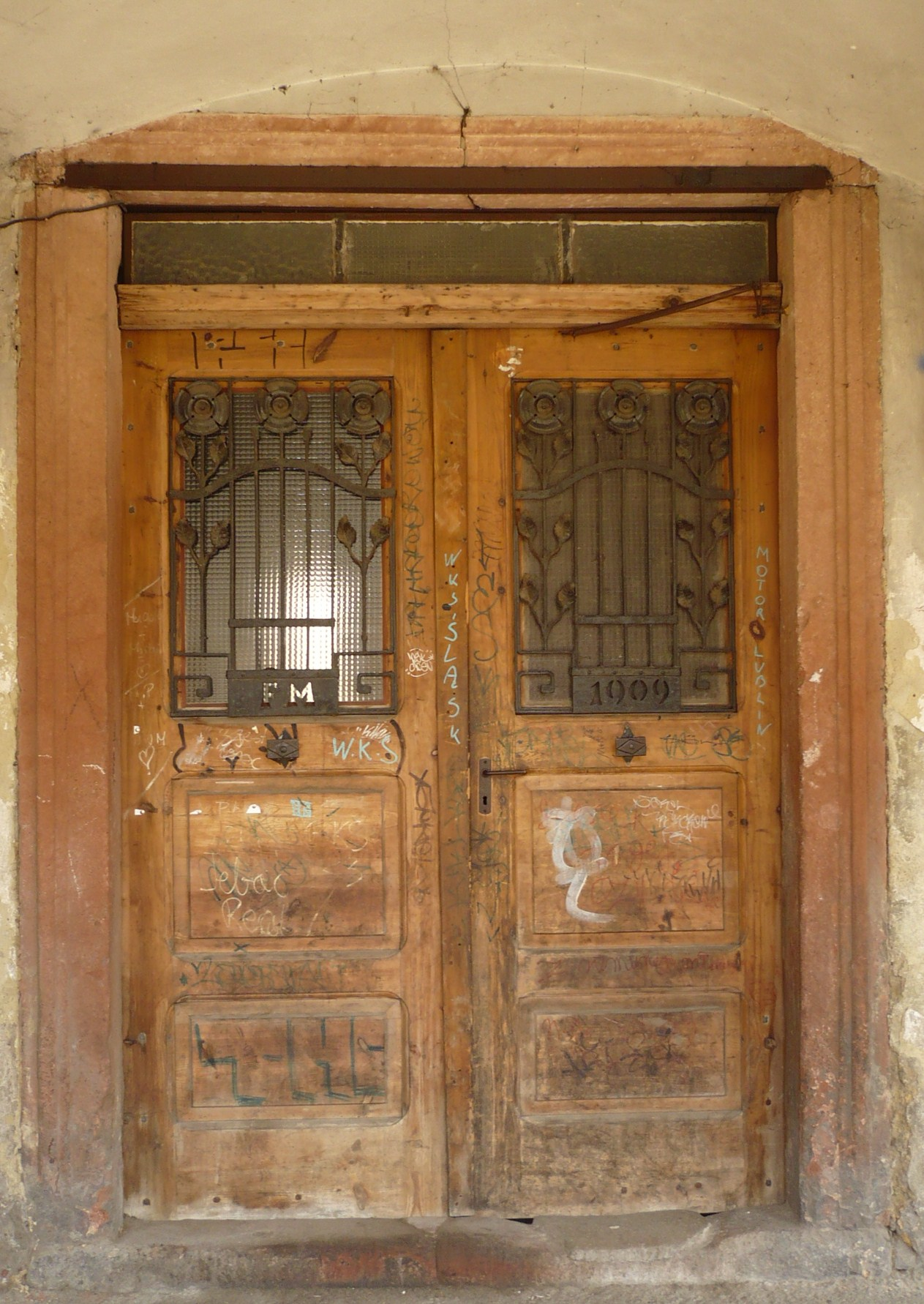 Nowa Ruda ul. Nadrzeczna 5, brama